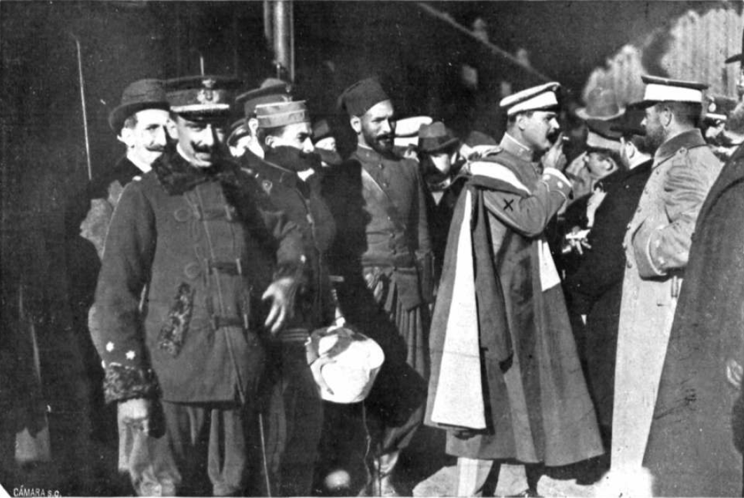 El teniente coronel Manuel Fernández Silvestre, jefe de las fuerzas españolas en Larache y Alcazarquivir, es recibido por compañeros a su llegada a Madrid el 11 de diciembre de 1911. Le acompaña su ordenanza, el sargento de la Policía indígena Ab-el-Kader.